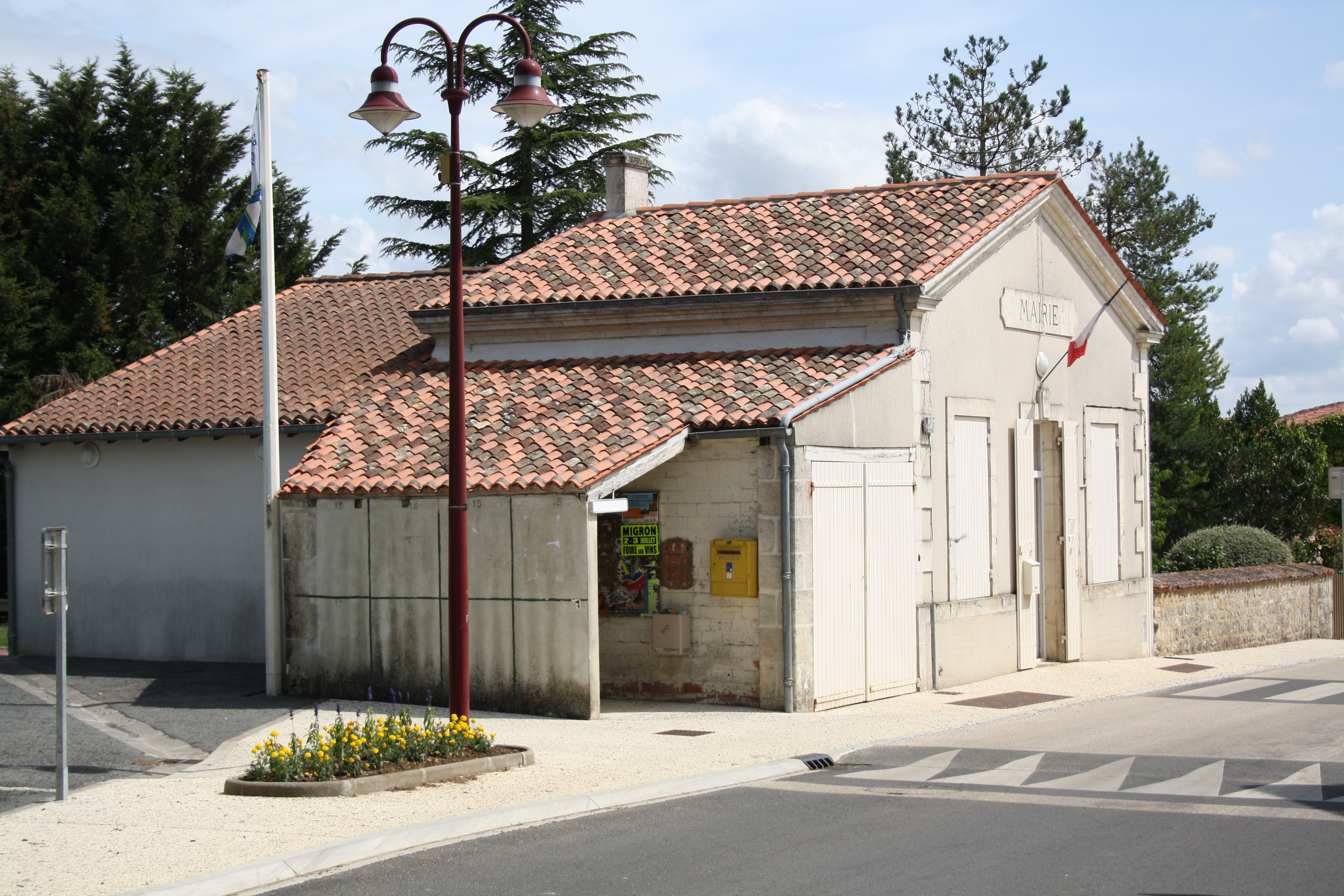 Marie de Taillant (Charente-Maritime, France).